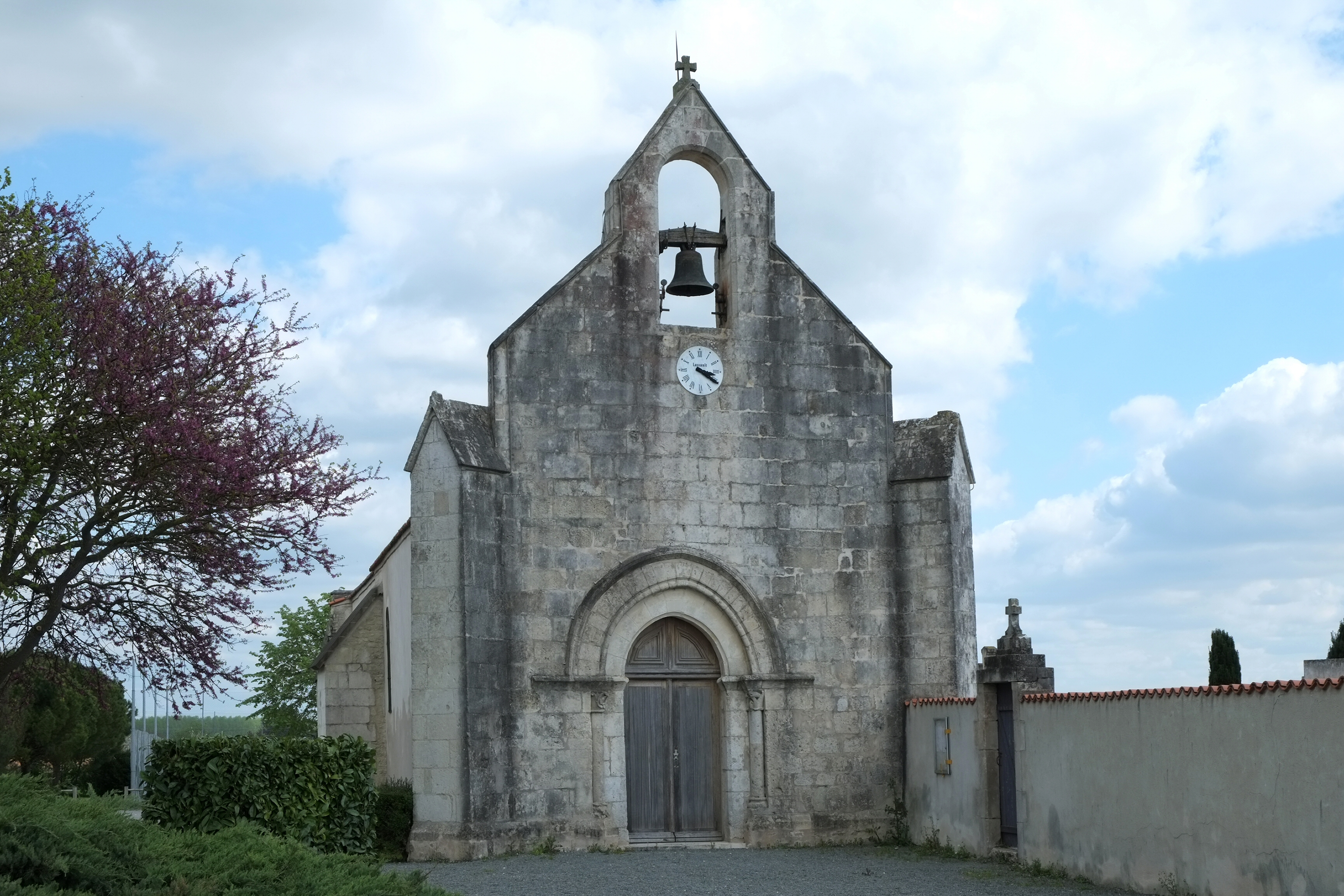 Église Saint-Pierre Angliers Charente-Maritime France